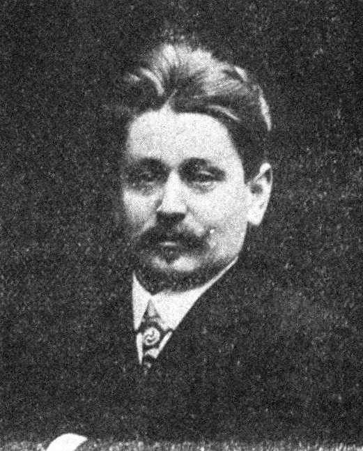 Österreichischer Politiker, Reichsratswahl 1907, Name siehe Dateiname